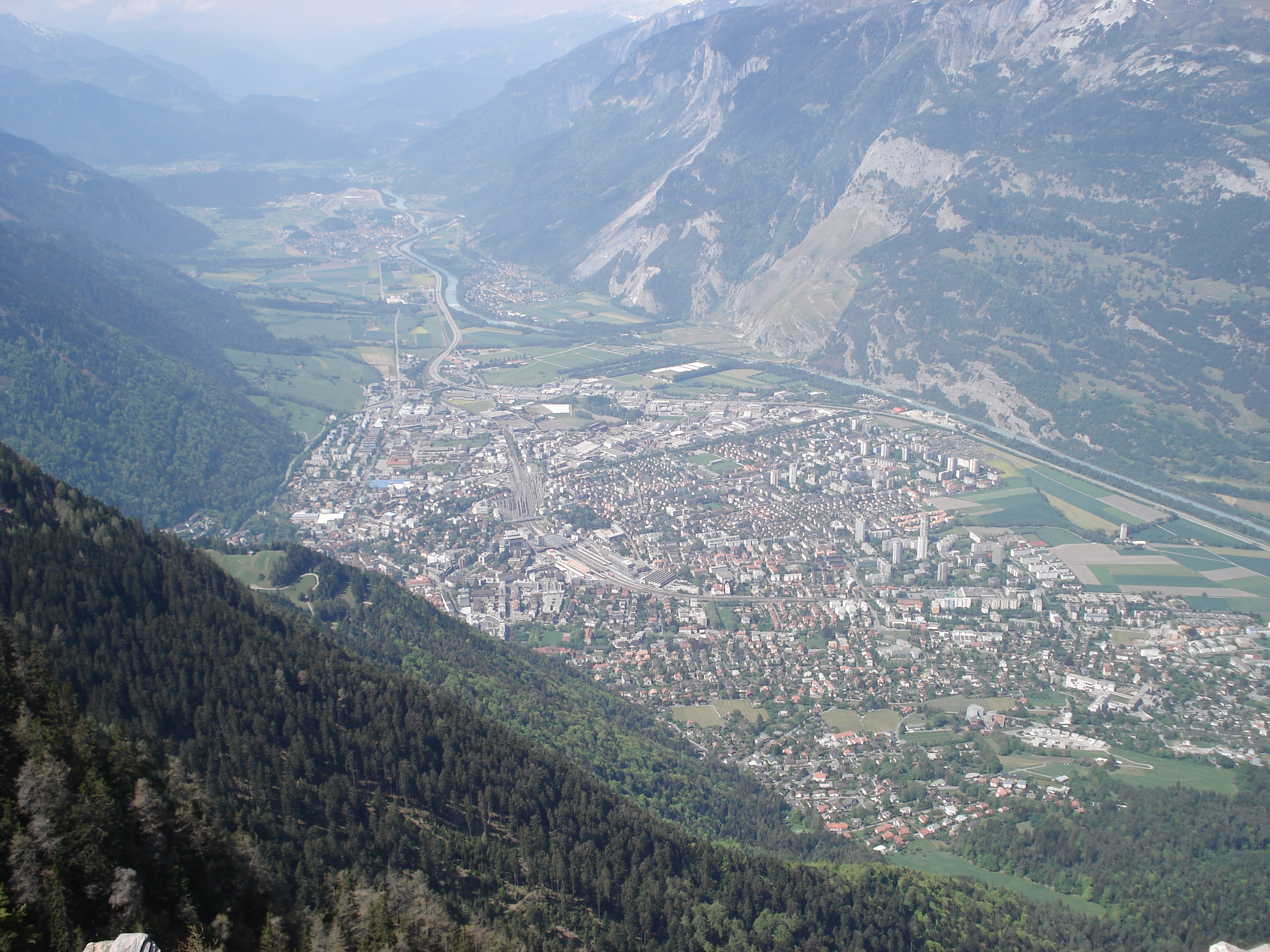 Chur vom Fürhörnli aus gesehen